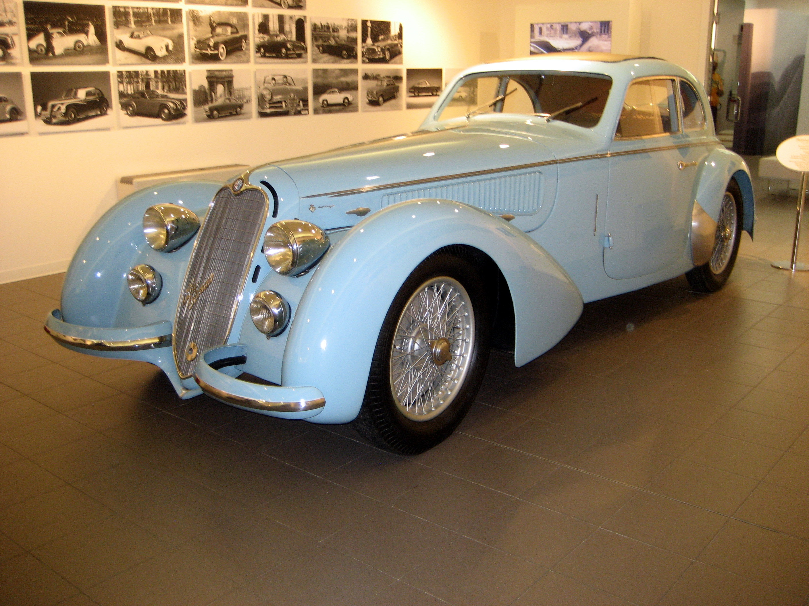 1938 Alfa Romeo 8C at Galleria Ferrari in Maranello, Italy